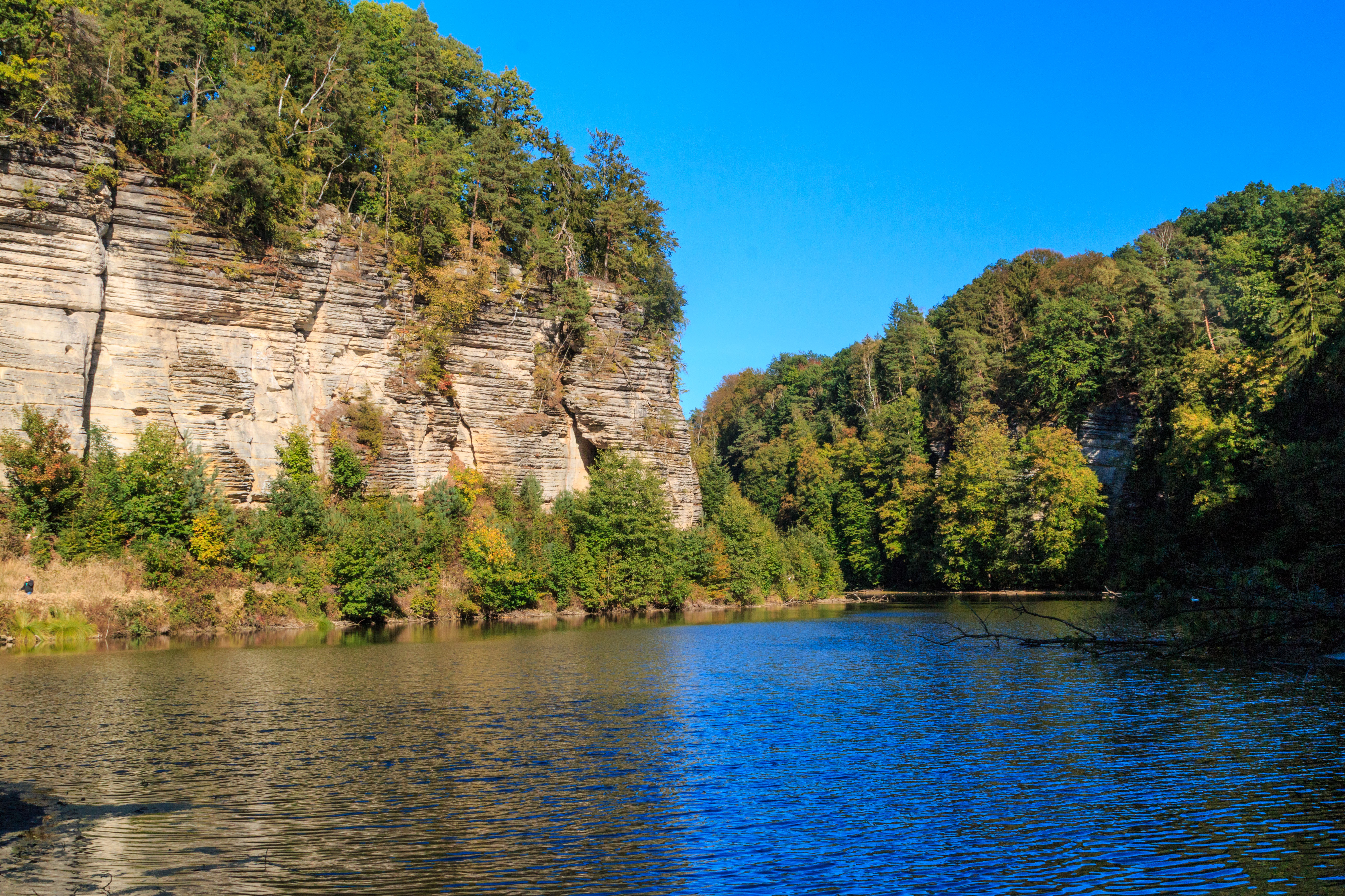 Oborský rybník v údolí Plakánku Project: Vodstvo